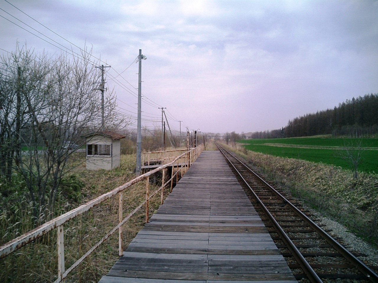 様舞駅ホーム